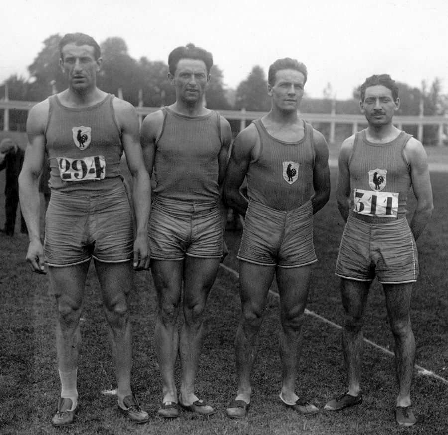 VIIes Olympiades à Anvers : équipe française 1600 m relais : de gauche à droite : André Devaux, Fery : [photographie de presse] / Agence Meurisse